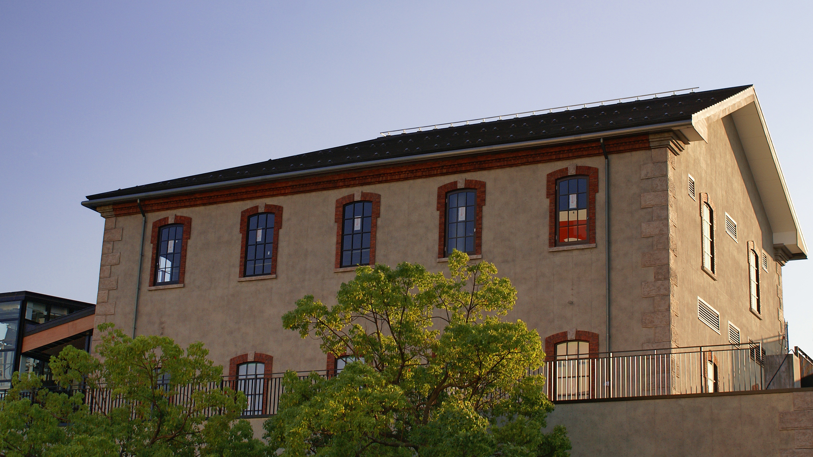 JR Nagahama Station in Nagahama, Shiga, Japan